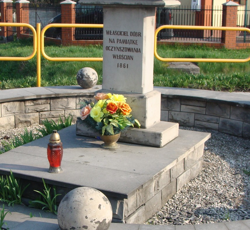 Morawica. Pomnik oczynszowania chłopów.